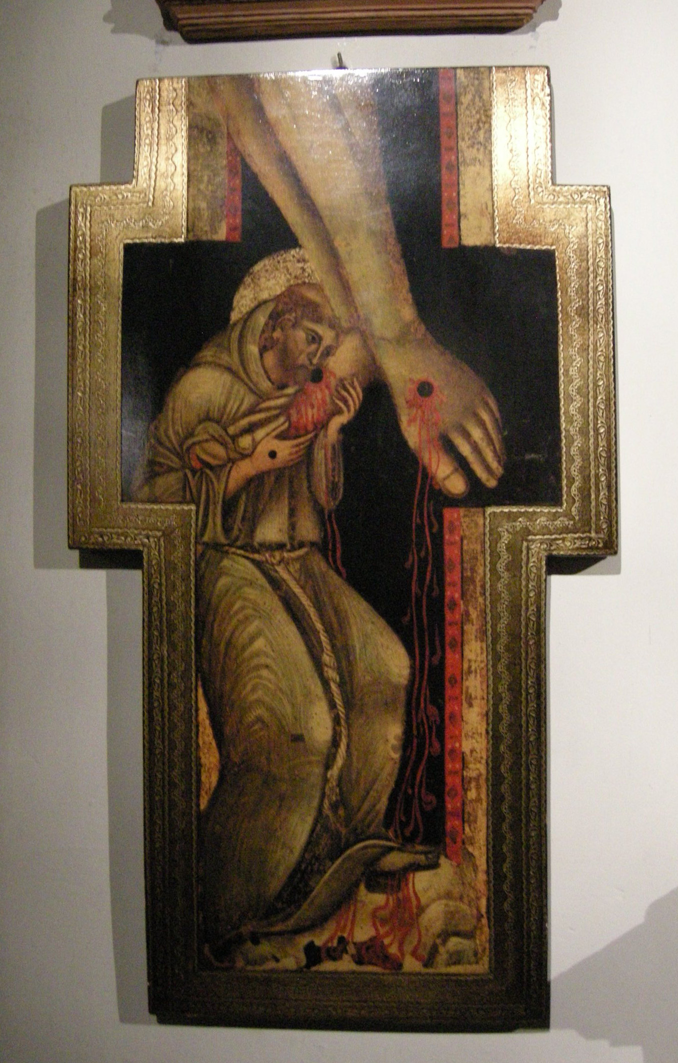 Chiesa di san biagio a petriolo, interno